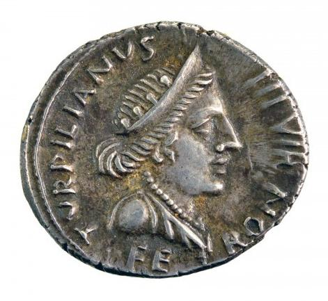 Auguste, denier en argent frappé par le triumvir monétaire Petronius Turpillianus avec le buste de profil de la déesse Feronia couronnée d'un diadème, habillée d'un drapé, un collier autour du cou. Inscription: TURPILLIANUS III VIR FE RON - cf Cohen monnaies d'Auguste, C478 et suiv.